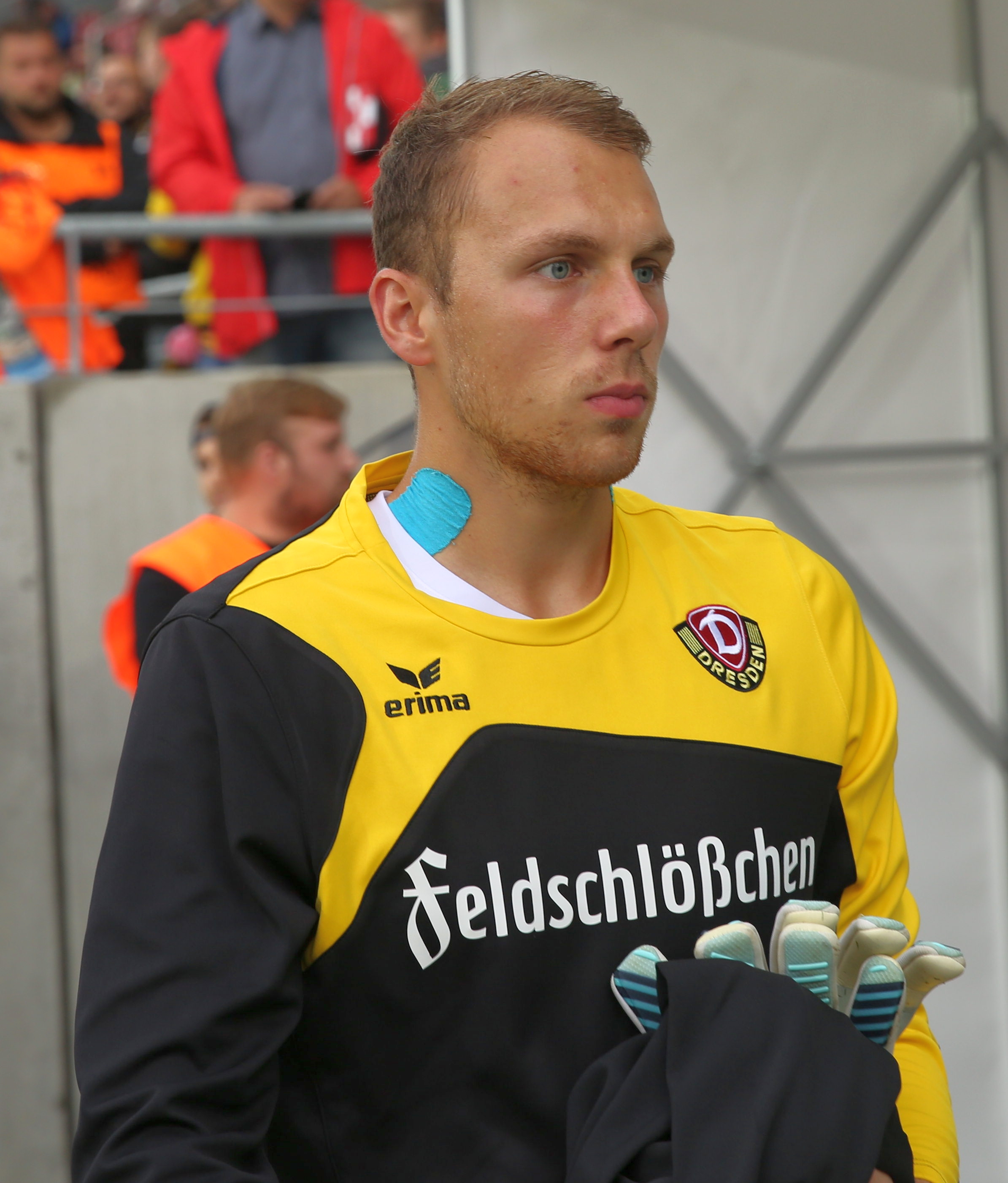 DFB-Pokal 2017/18, 1. Hauptrunde, TuS Koblenz gegen SG Dynamo Dresden: Marvin Schwäbe (SG Dynamo Dresden)